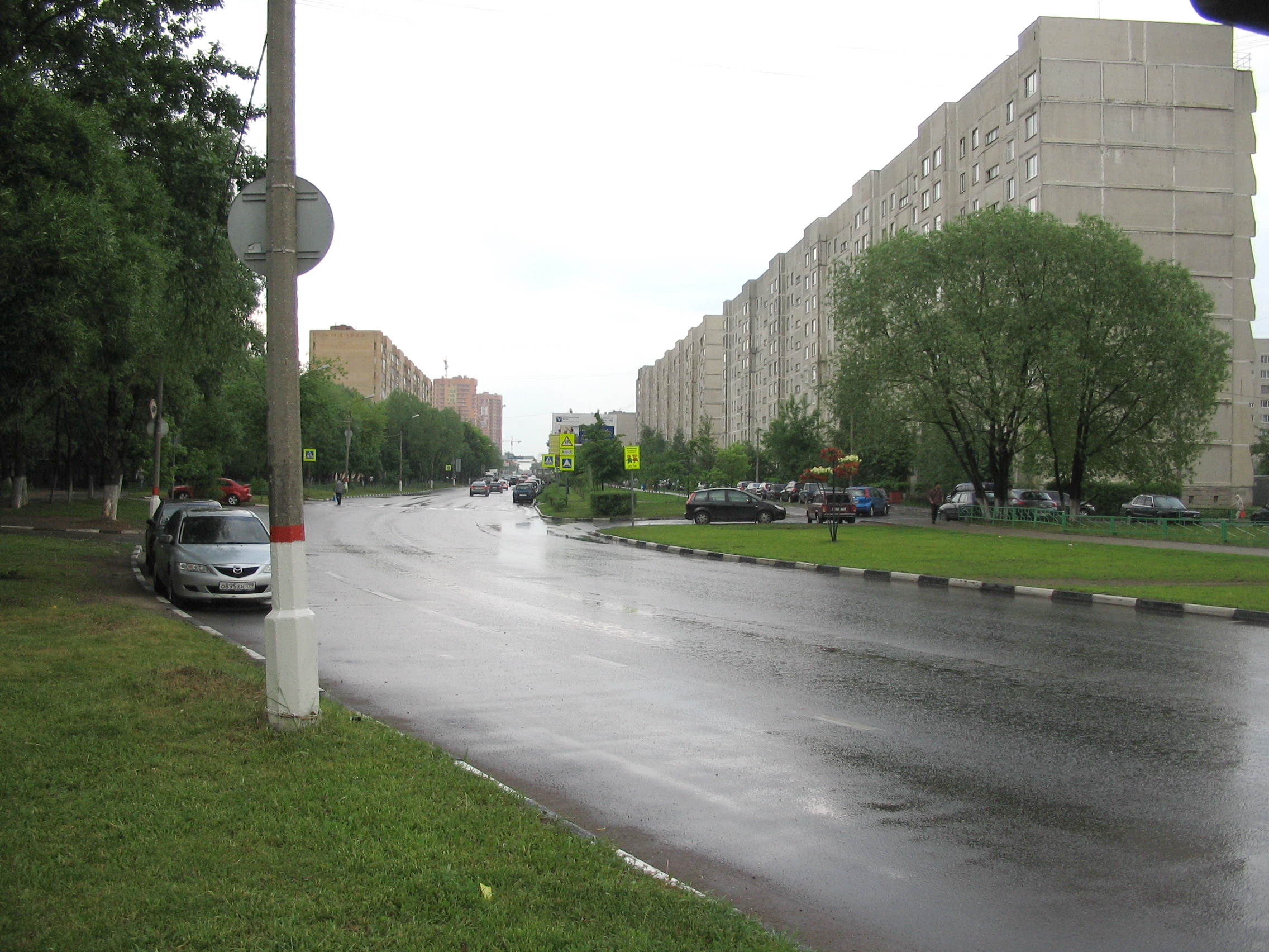 Город Реутов, Юбилейный проспект.